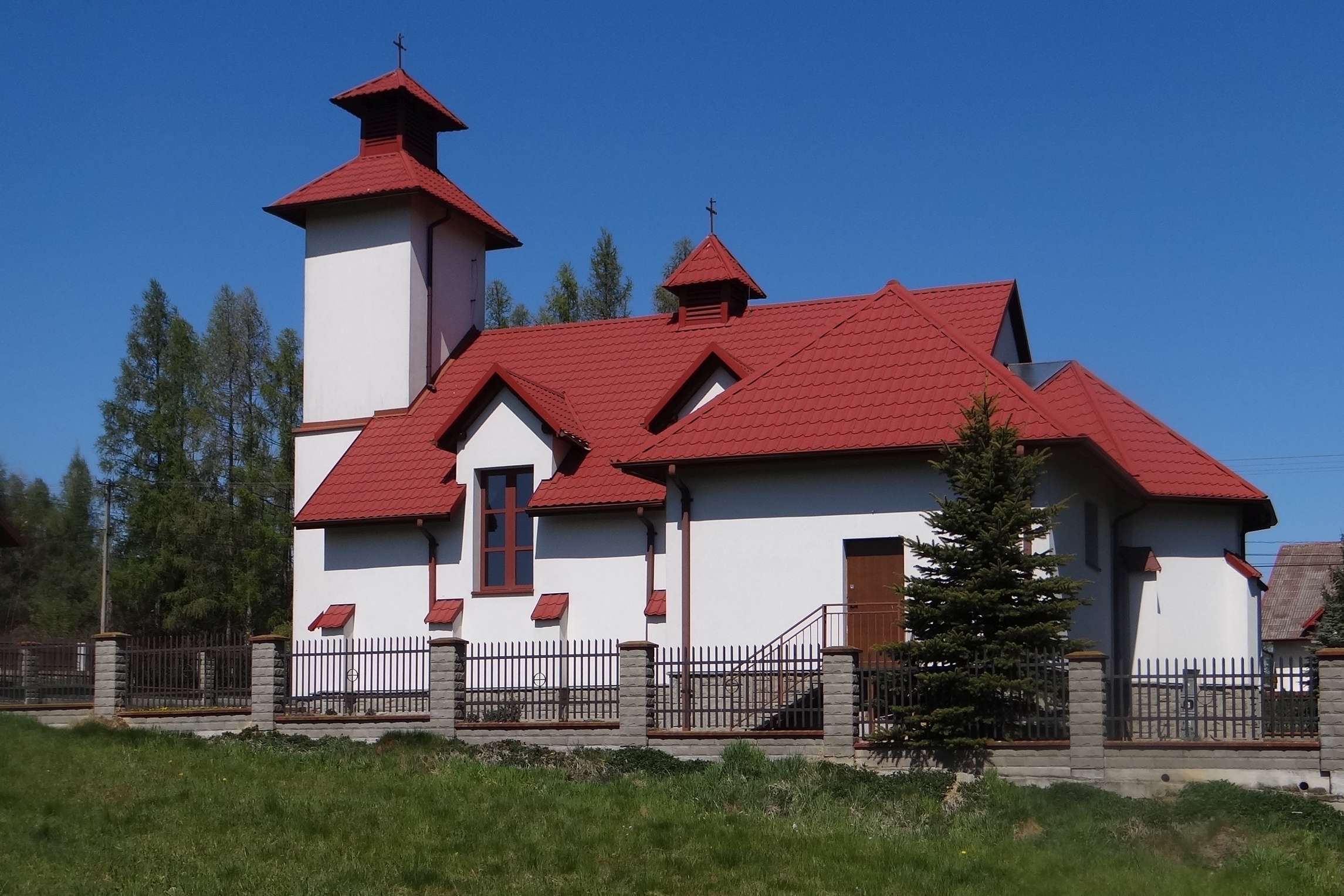 Borówna. Kościół